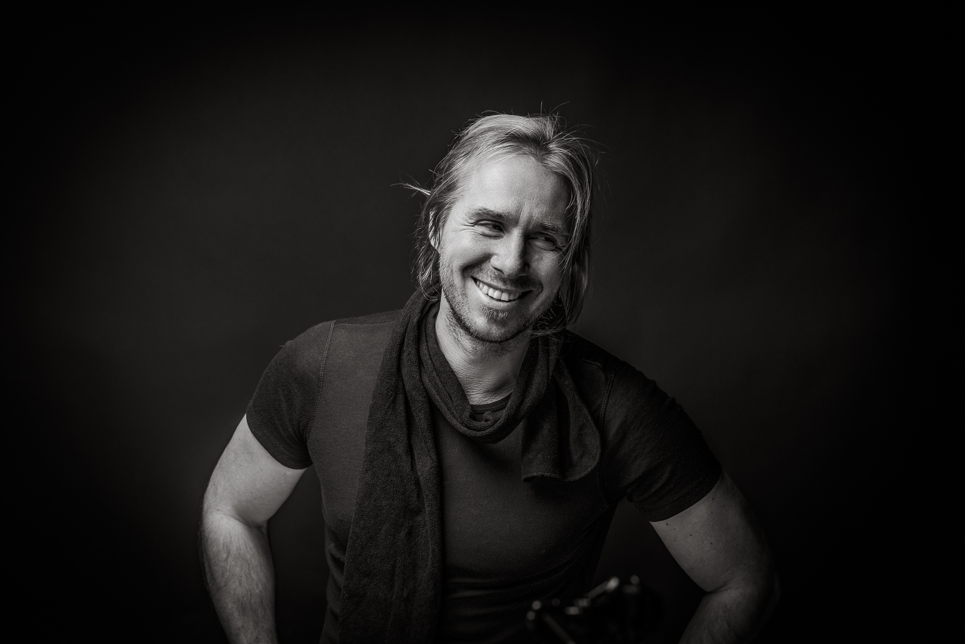 Jugendbuchautor Patrick Hertweck aus Freiburg